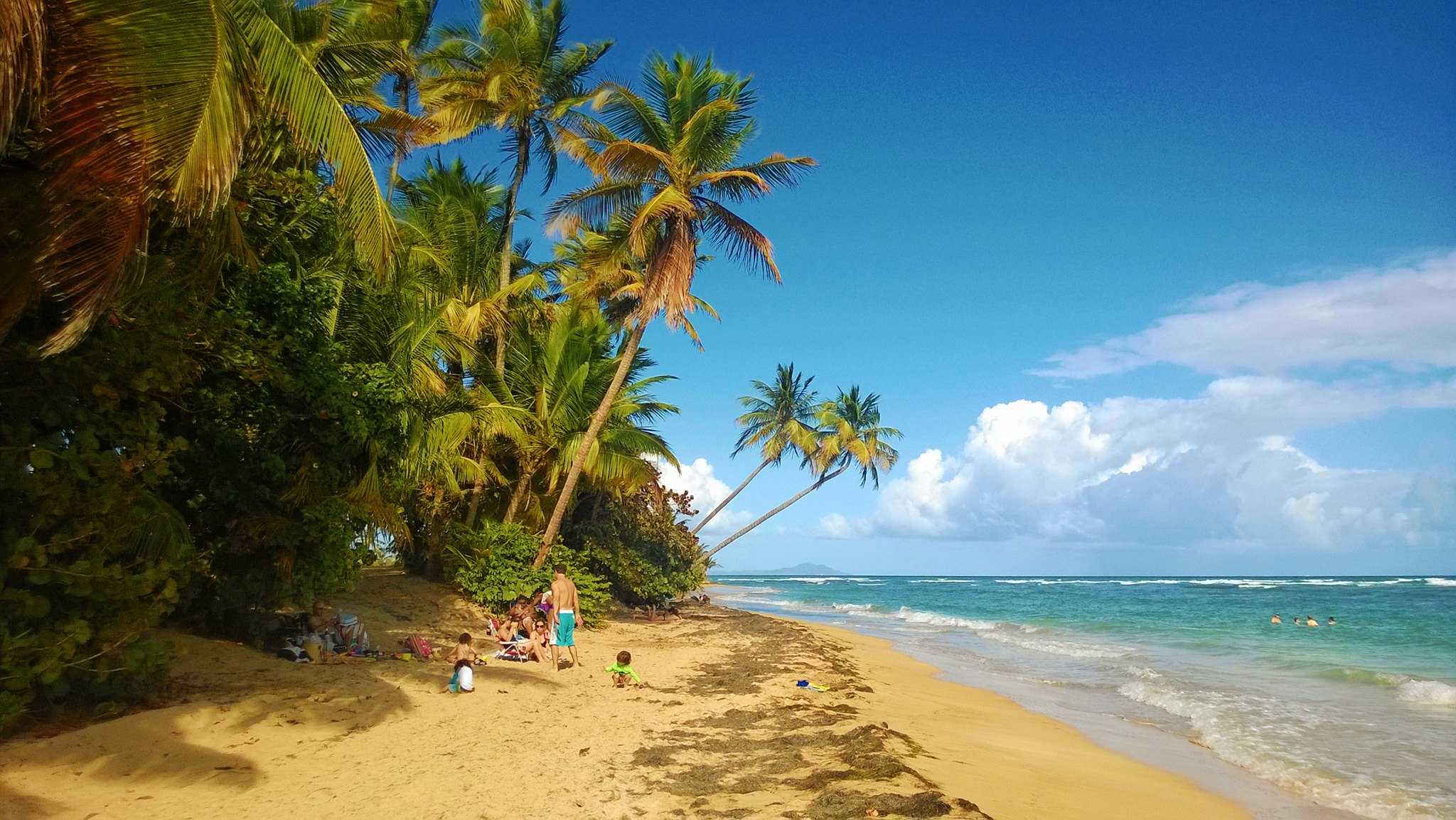 Punta Candelero, Humacao, Puerto Rico (2014)